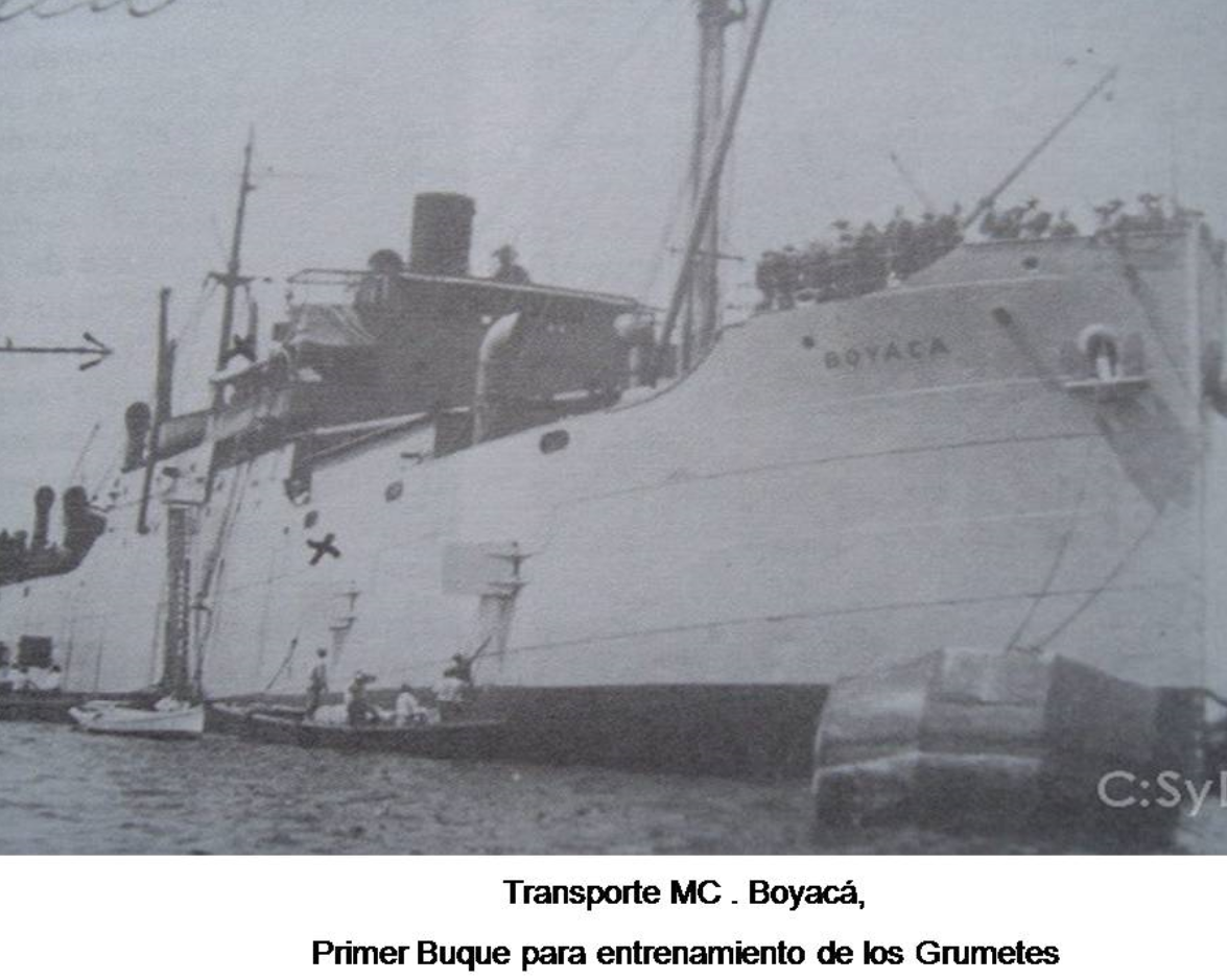 arc boyaca